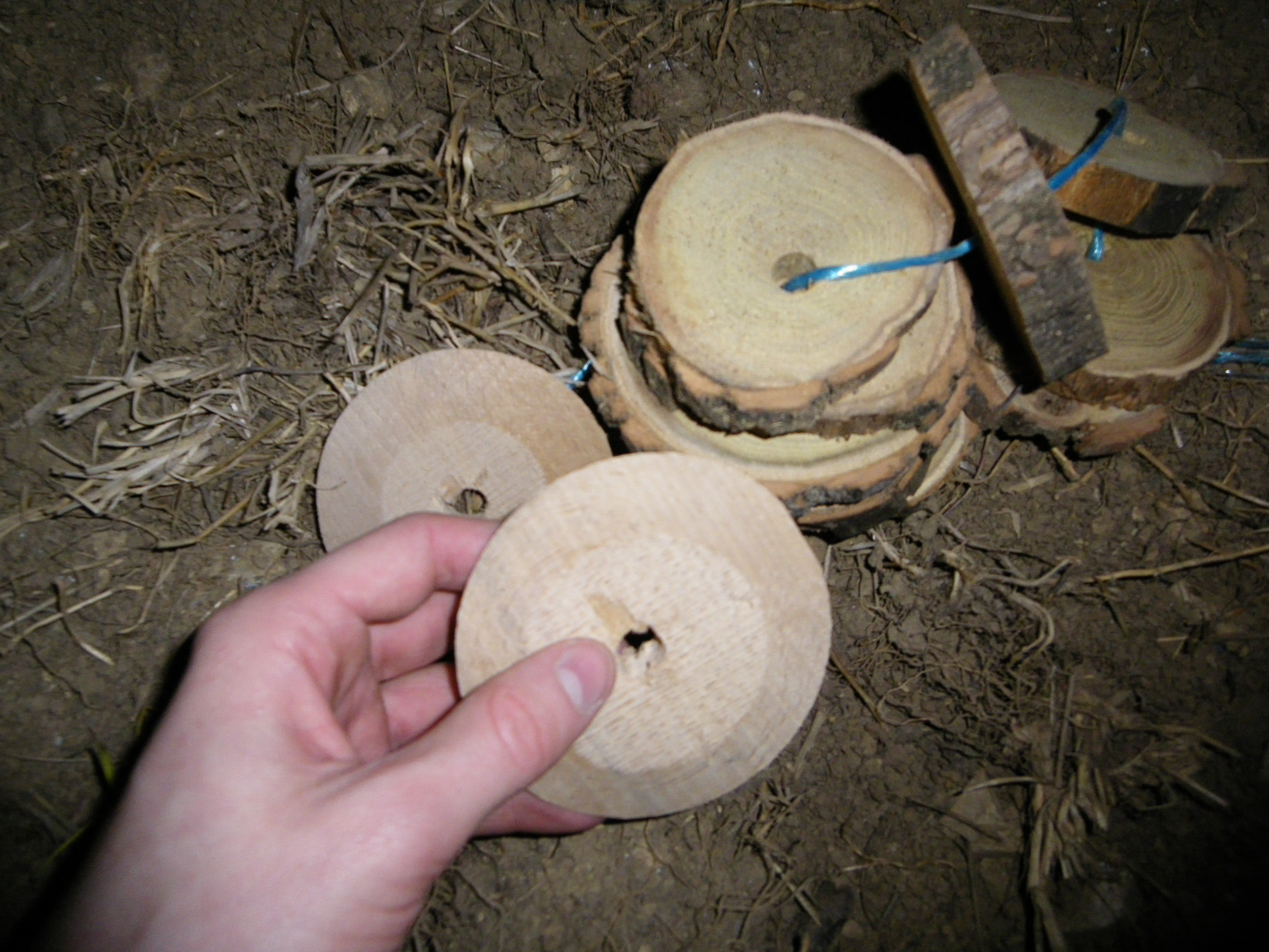 Rondins de bois utilisé pour le Schiewackefier